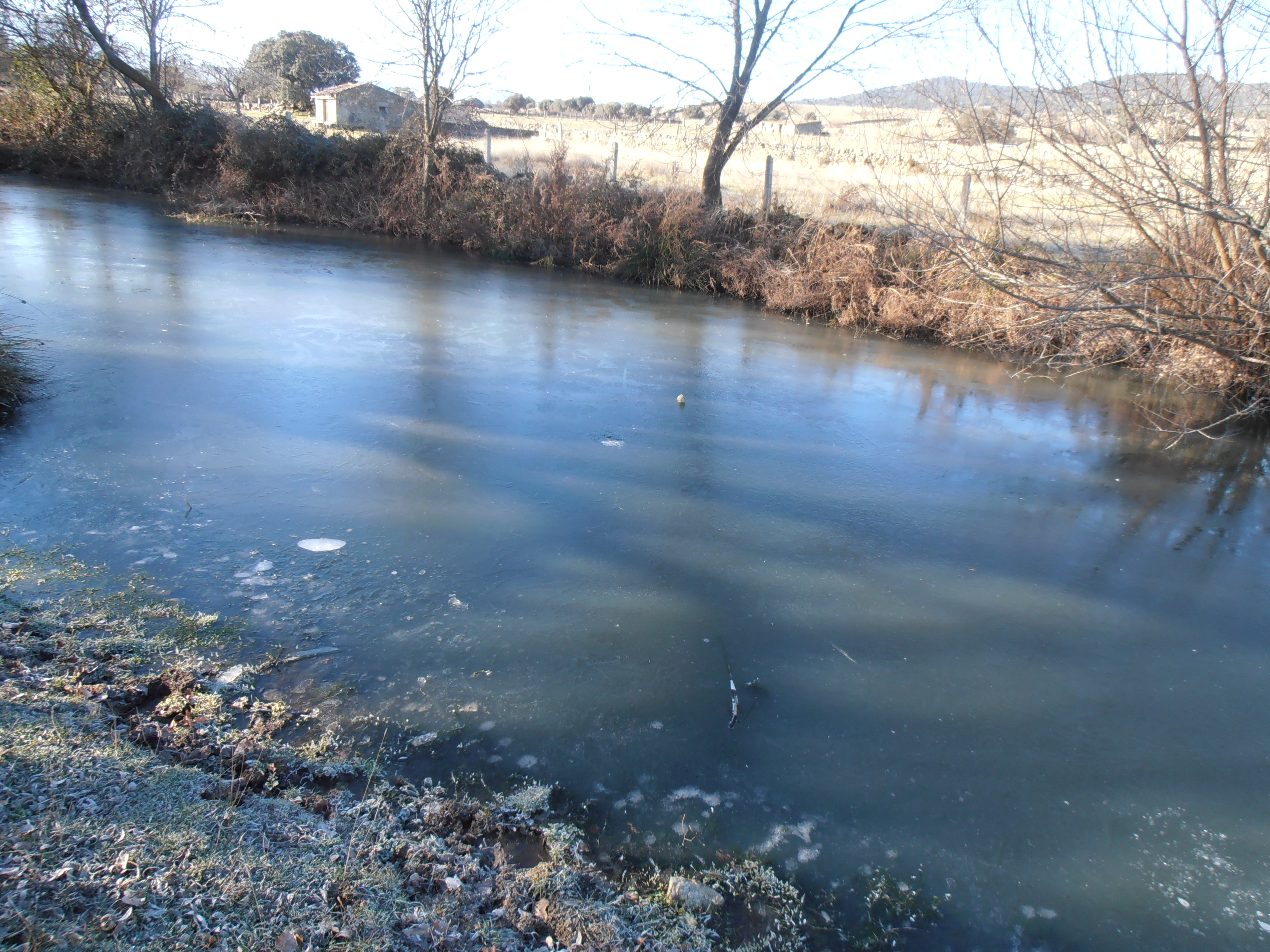 El Pantano del Valvanera helado en invierno